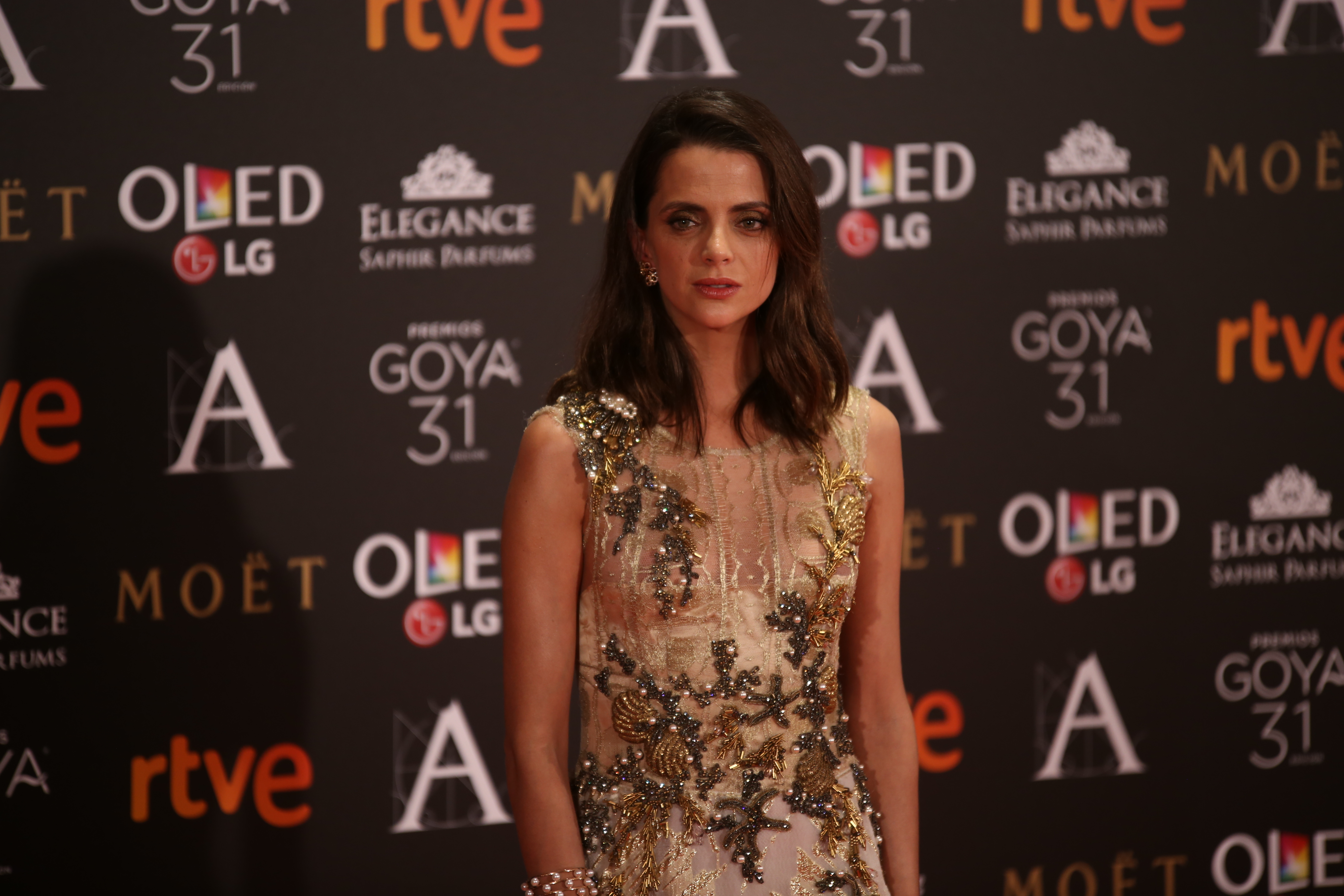 Premios Goya 2017